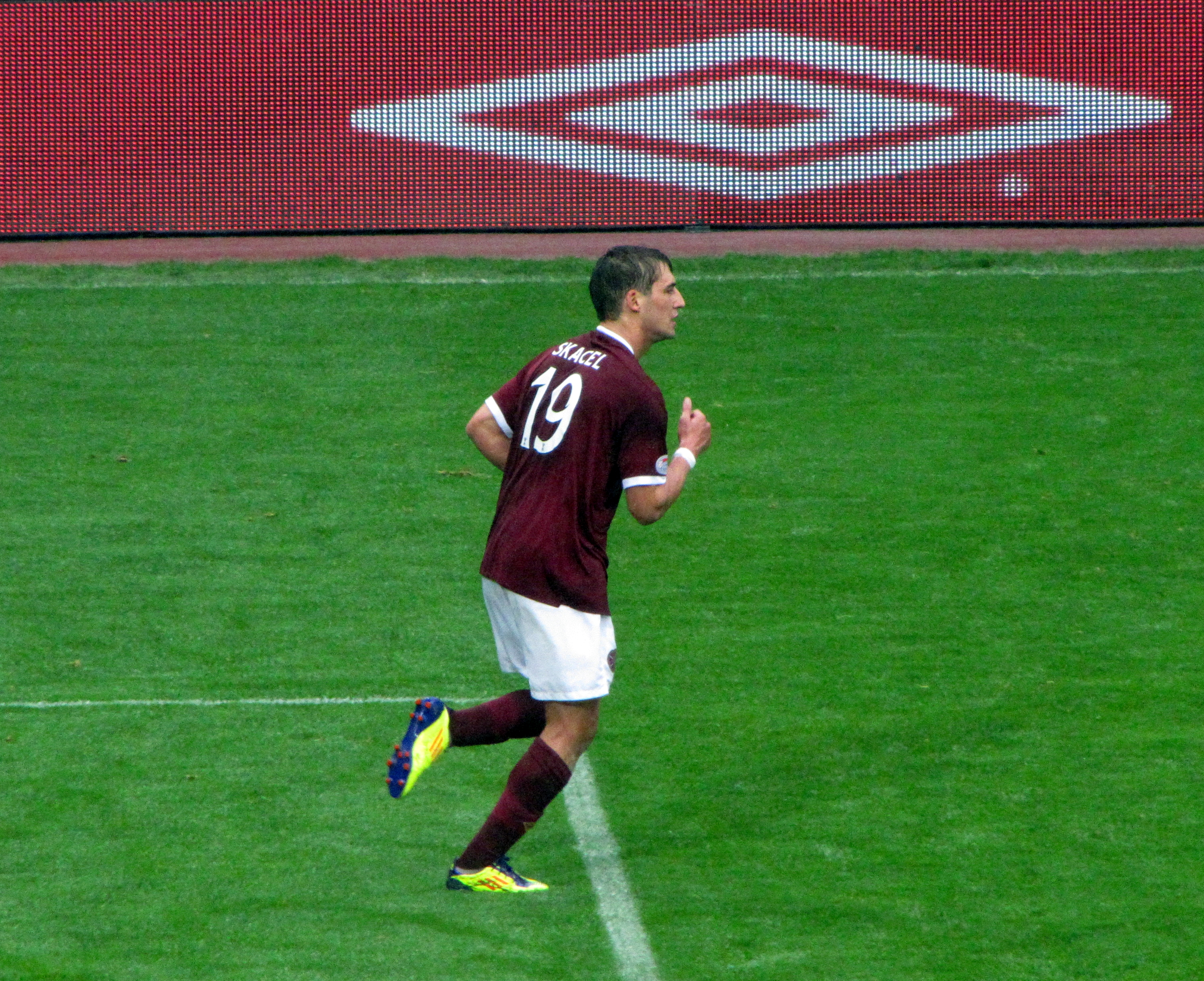 Rudi Skácel - Hearts - Celtic 2:0